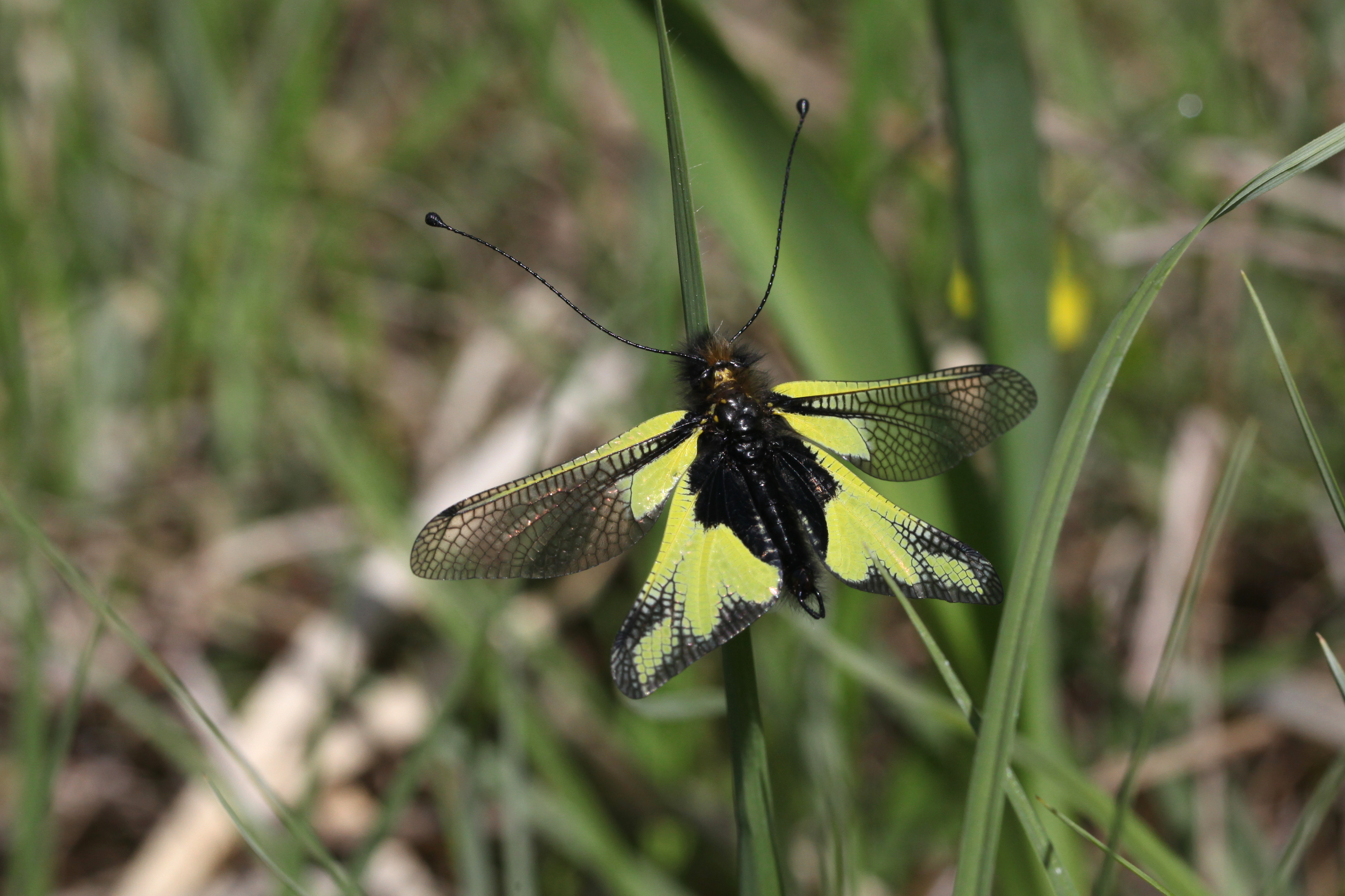 Un Ascalaphe soufré (Libelloides coccajus) dans la zone humide à Fontelenay